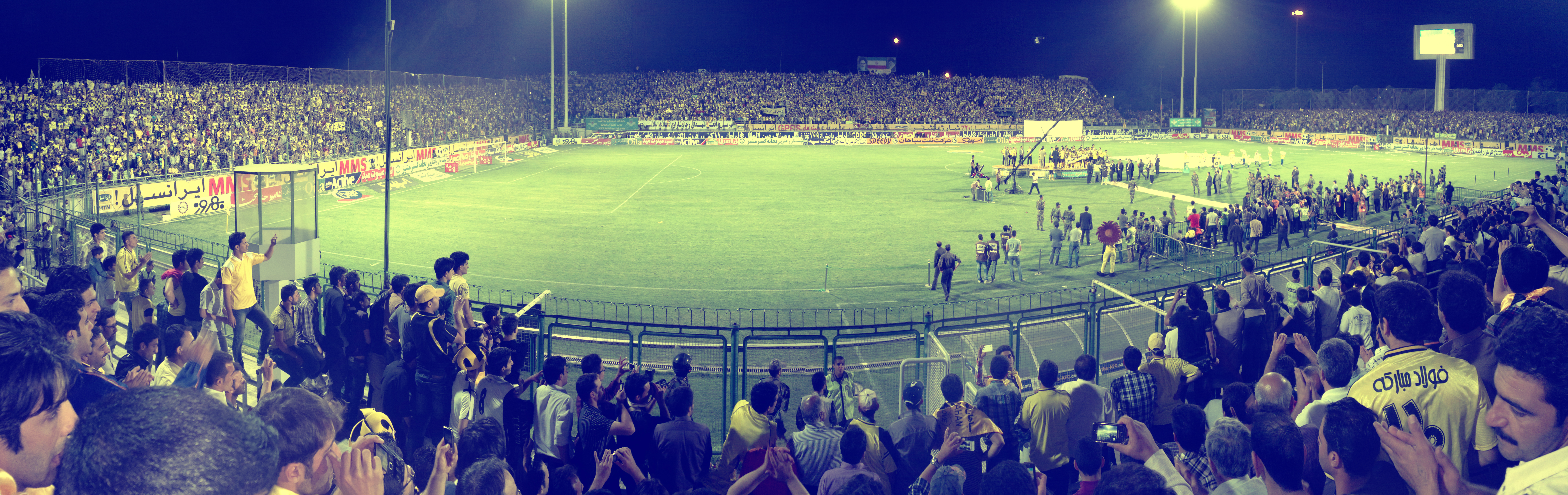 بازیکنان فوتبال سپاهان اصفهان منتظر گرفتن جام قهرمانی از دستان ریاست فدراسون فوتبال می باشند تا جام را در بالای سر خود ببرند